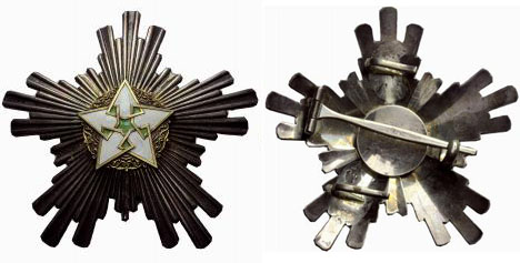 Звезда сирийского ордена "За гражданские заслуги" 1 класса (аверс и реверс)